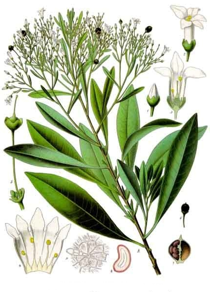 Duboisia. A blühender und fruchttragender Zweig. 1 Knospe; 2 Blüte; 3 dieselbe im Längsschnitt; 4 Korolle und Staubblätter; 5 Enddichasium mit Pistill; 6 Frucht; 7 Längsschnitt derselben; 8 Samen im Längsschnitt; 9 Haar. A und 6 natürliche Grösse; 1—5, 7, 8 vergrössert.